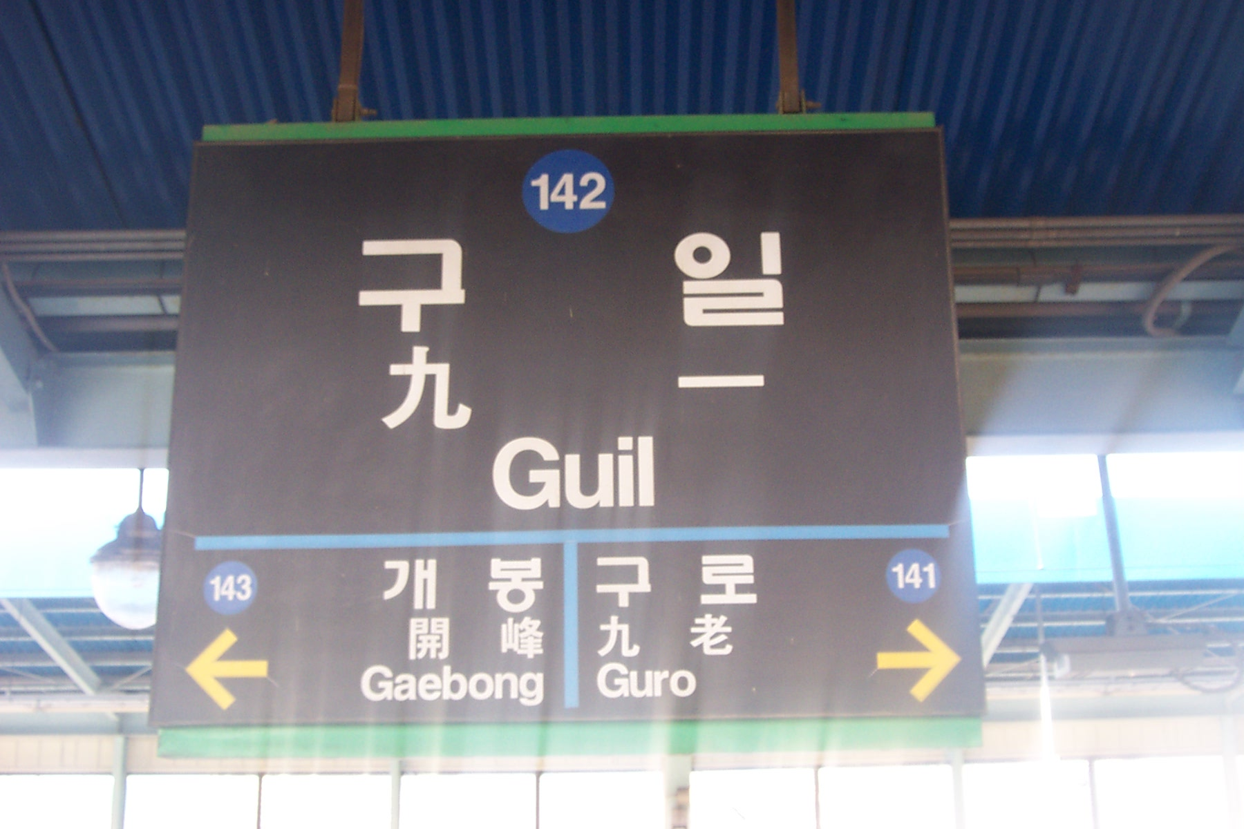 구일역 역명판